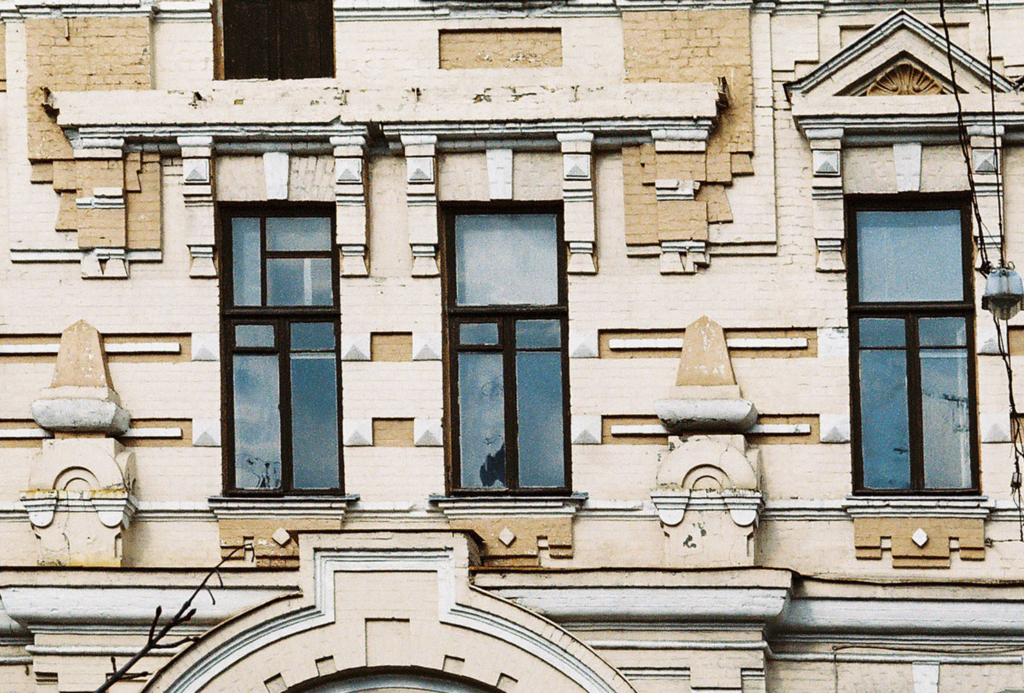 10 Б Хмельницкого